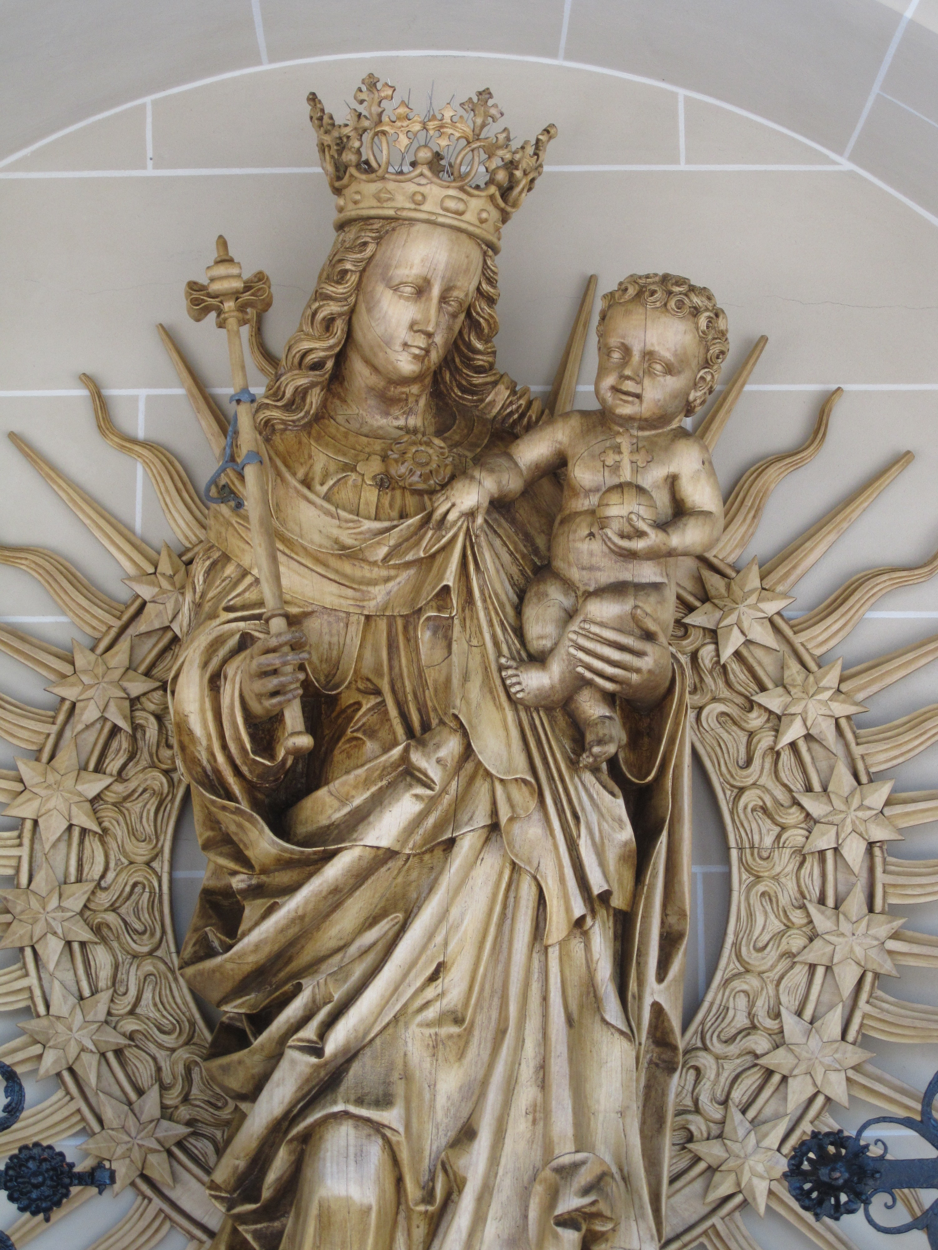 Grabmal der Familie Meckel auf dem Hauptfriedhof Freiburg